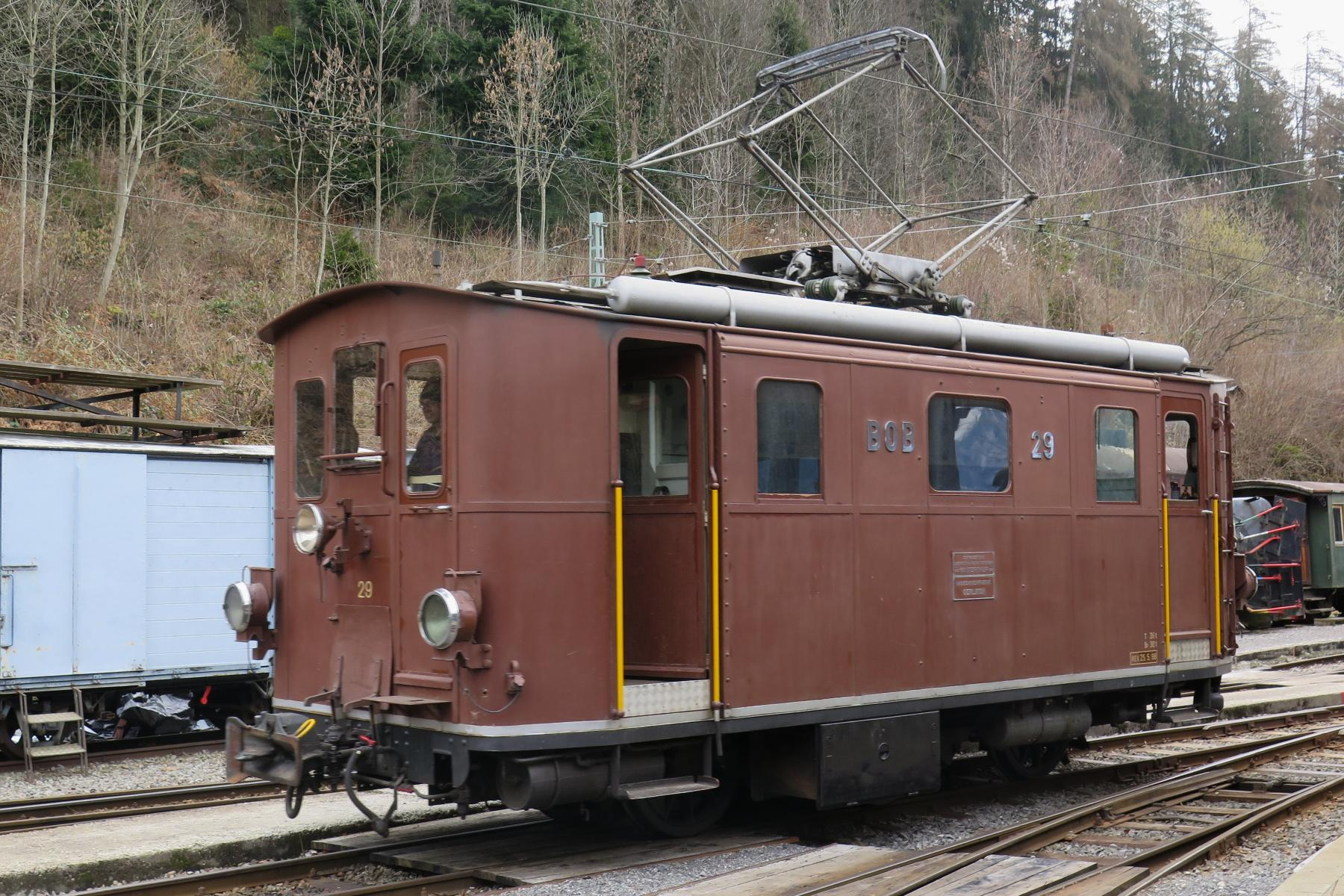 Berner Oberland-Bahn (BOB) HGe 3/3 29 abgeliefert 1926. Seit 2013 bei der Museumsbahn Blonay-Chamby (BC), heute ausgestellt in Chamby.